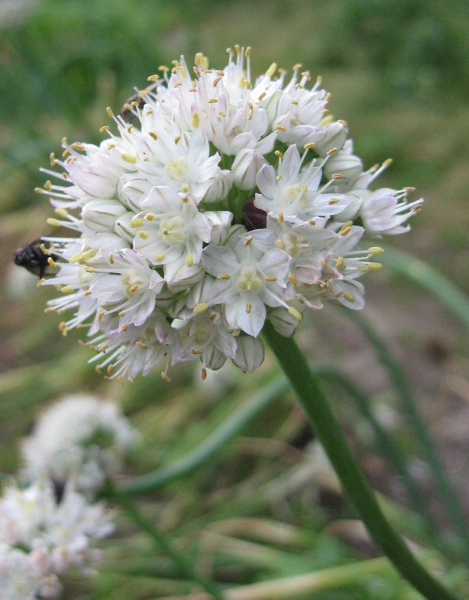 zelfgemaakte foto van de bloem van de St. Jansui